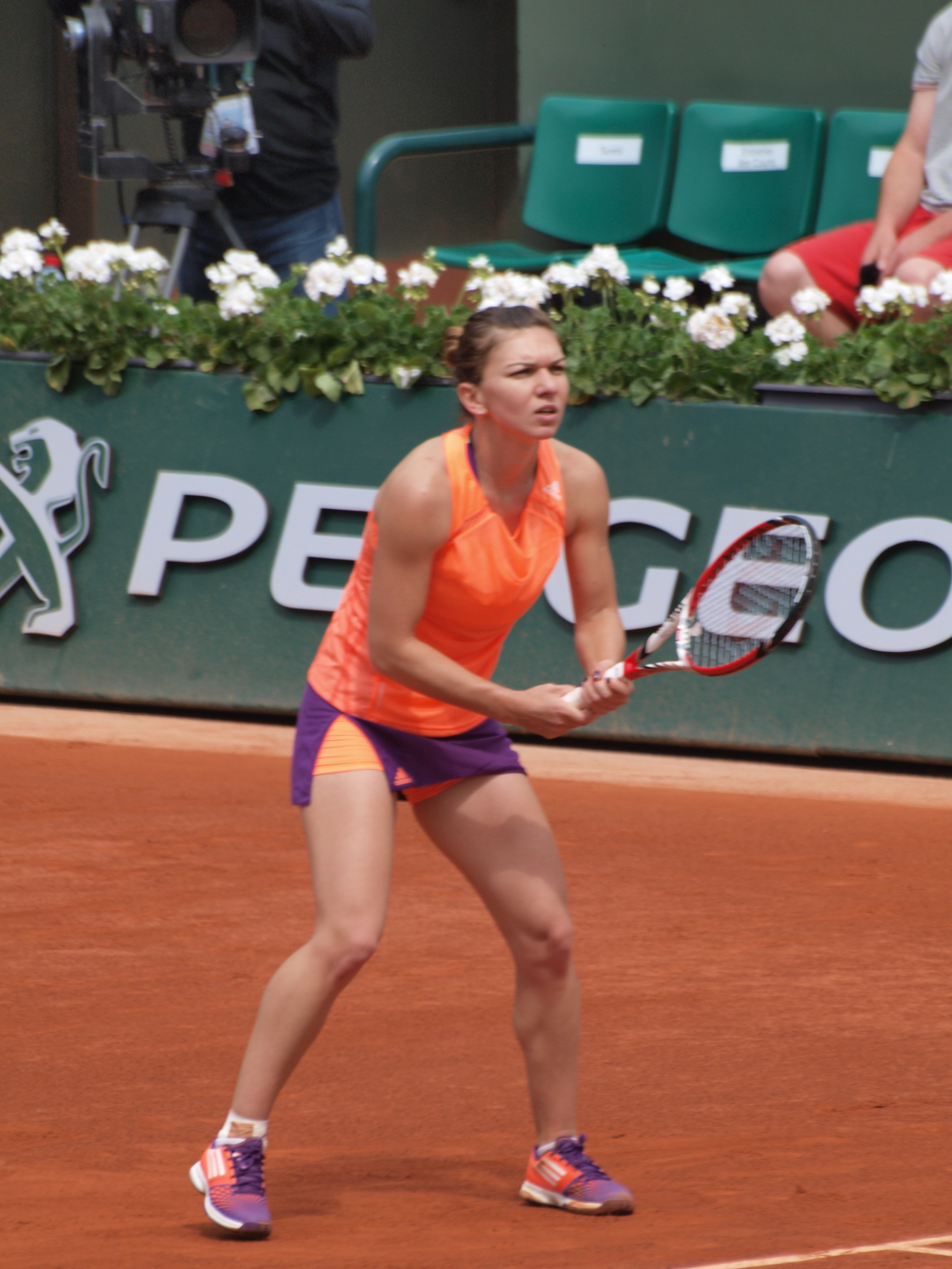 Internationaux de France de tennis, le 2 juin 2014, sur le court Philippe Chatrier : Simona Halep